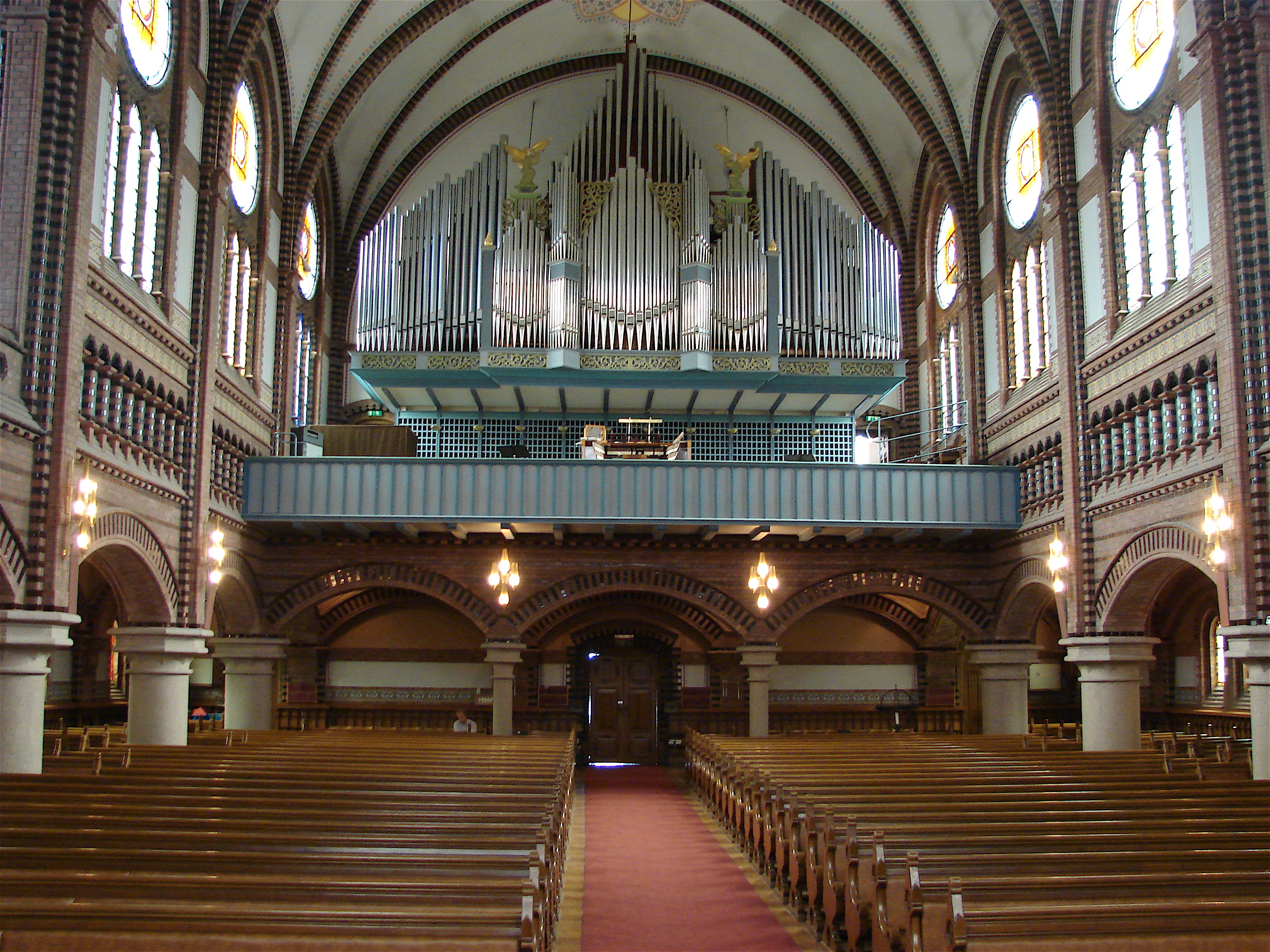 L´église de Skien (Scheen), organe